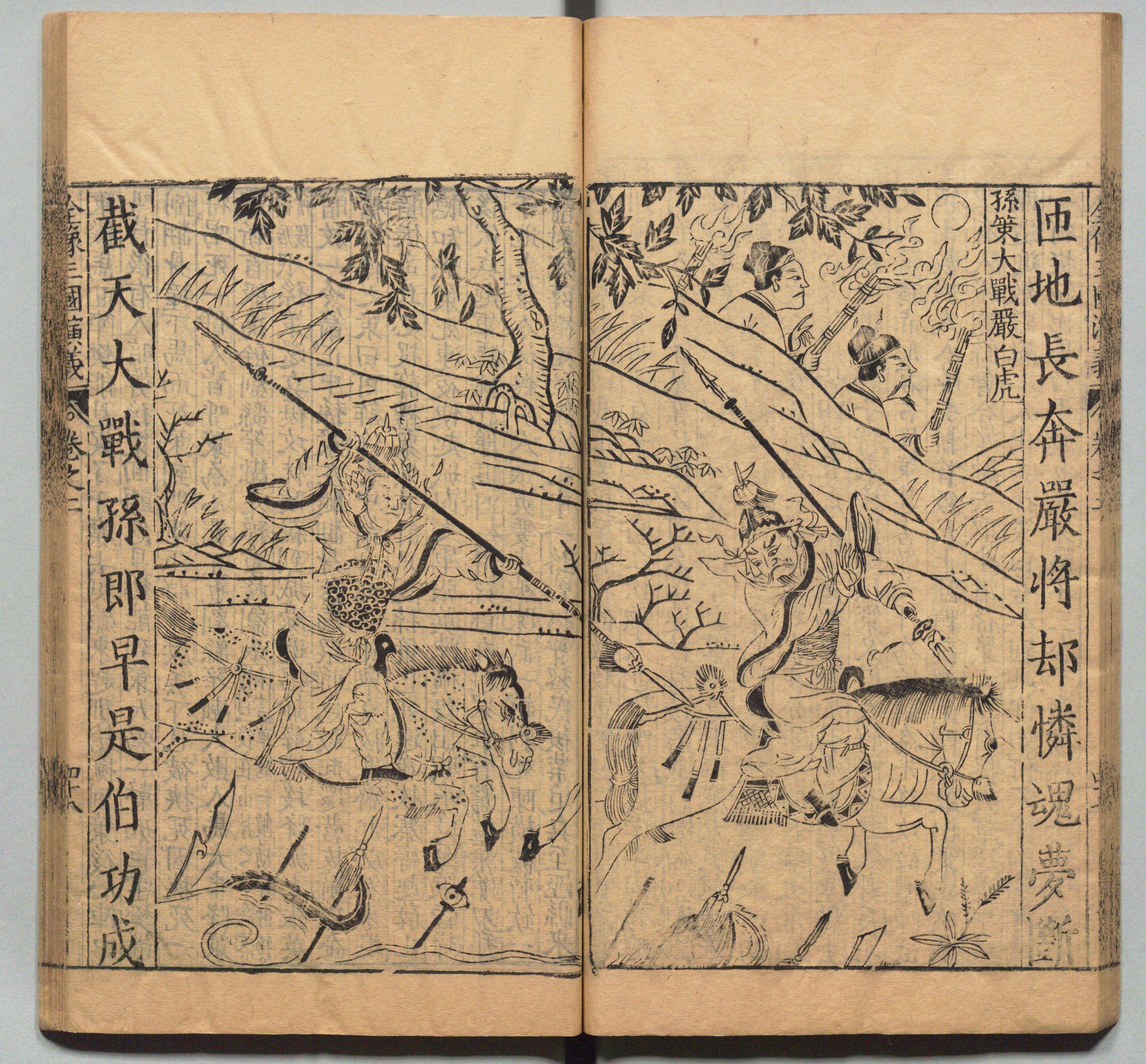 《新刊校正古本大字音释三国志通俗演义》 明万历十九年书林周曰校刊本